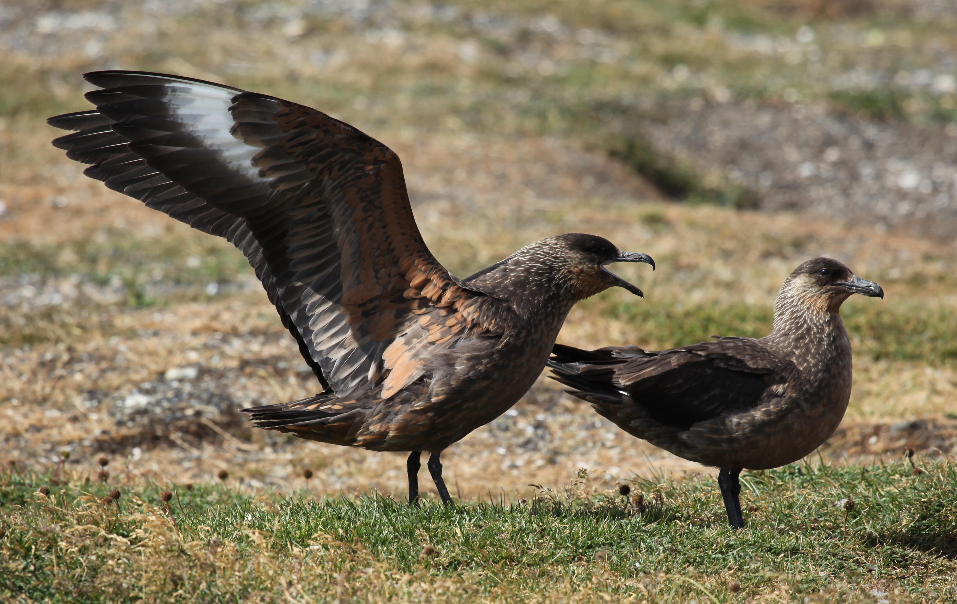 At Isla Martillo in Tierra del Fuego, Argentina.